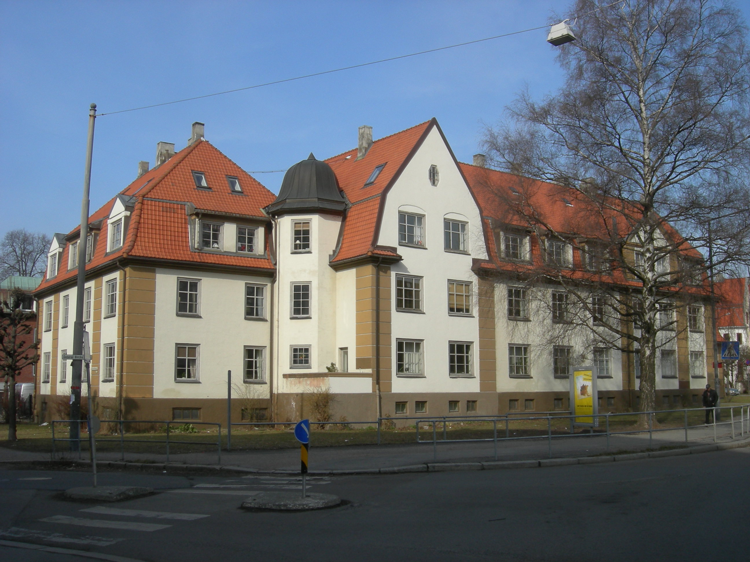 Lindern, seen from Geitmyrsveien, Oslo, Norway. Built 1917.